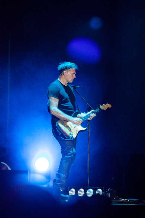 20130710-ByanAdamsLucca-0095